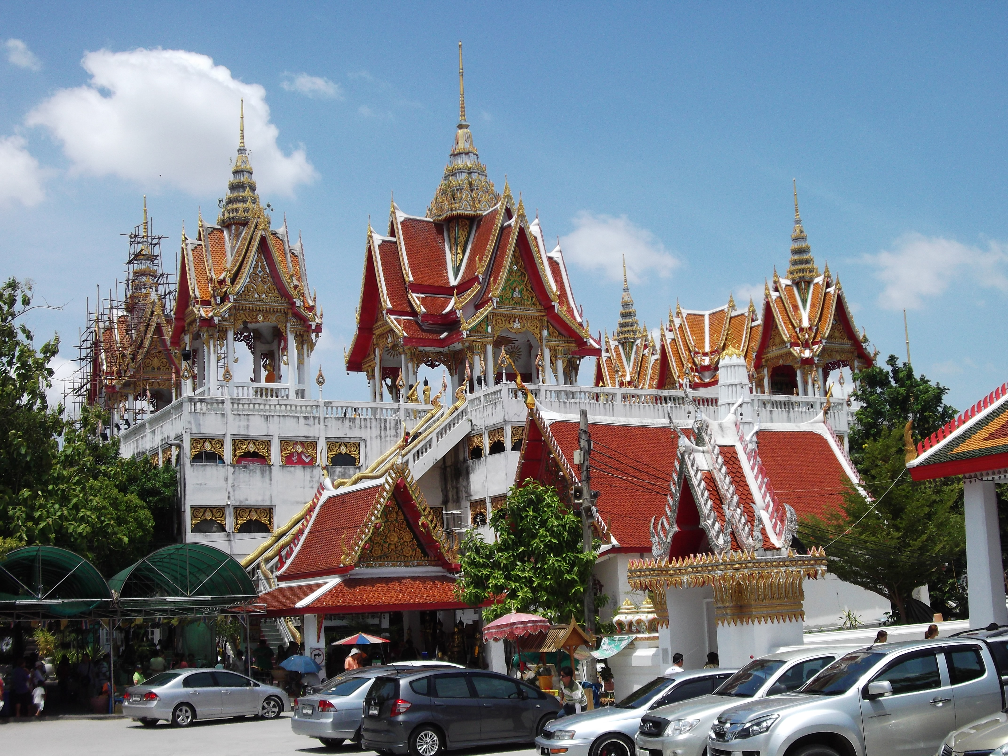 วัดบุคคโล